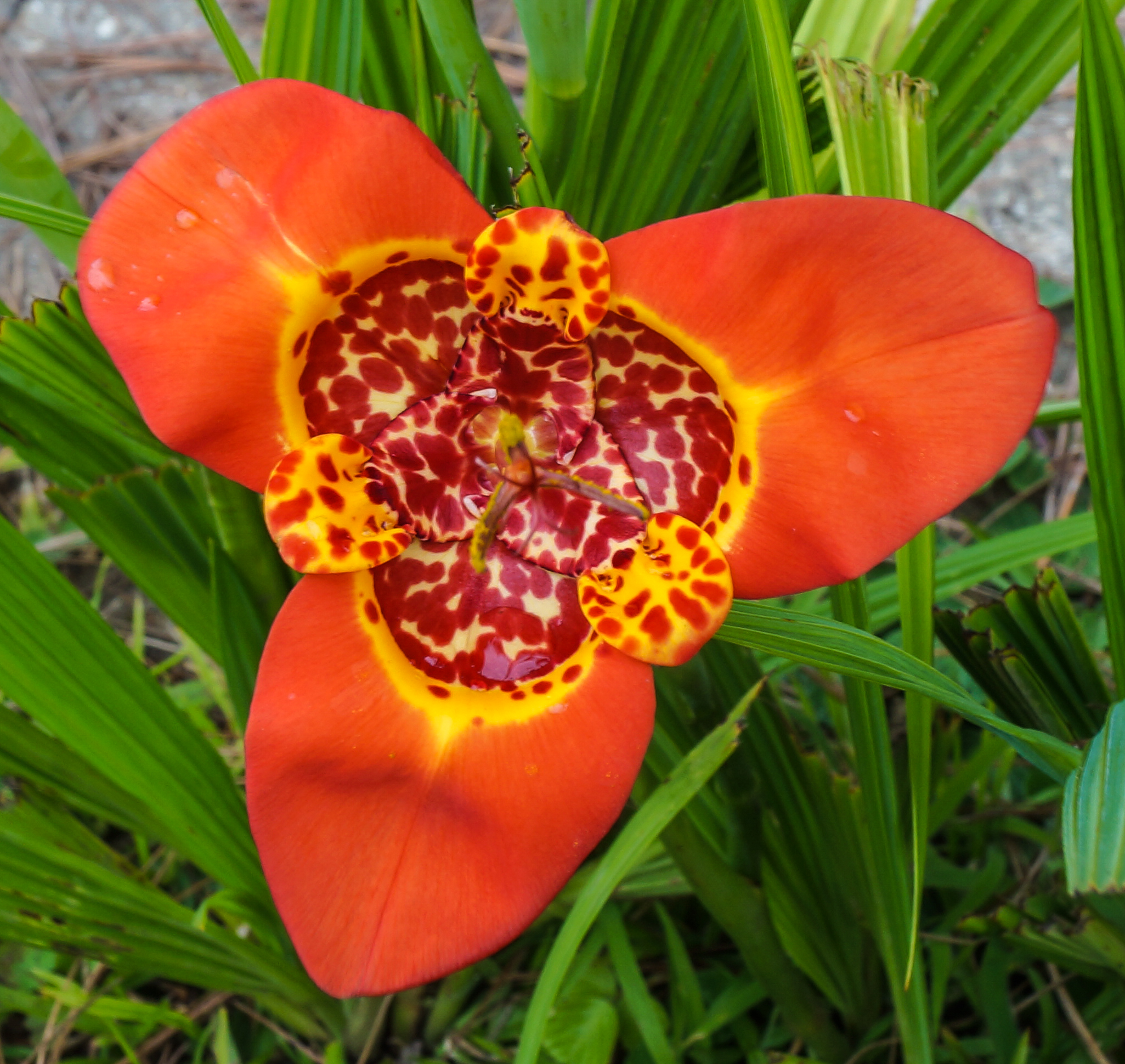 Tigridia pavonia.